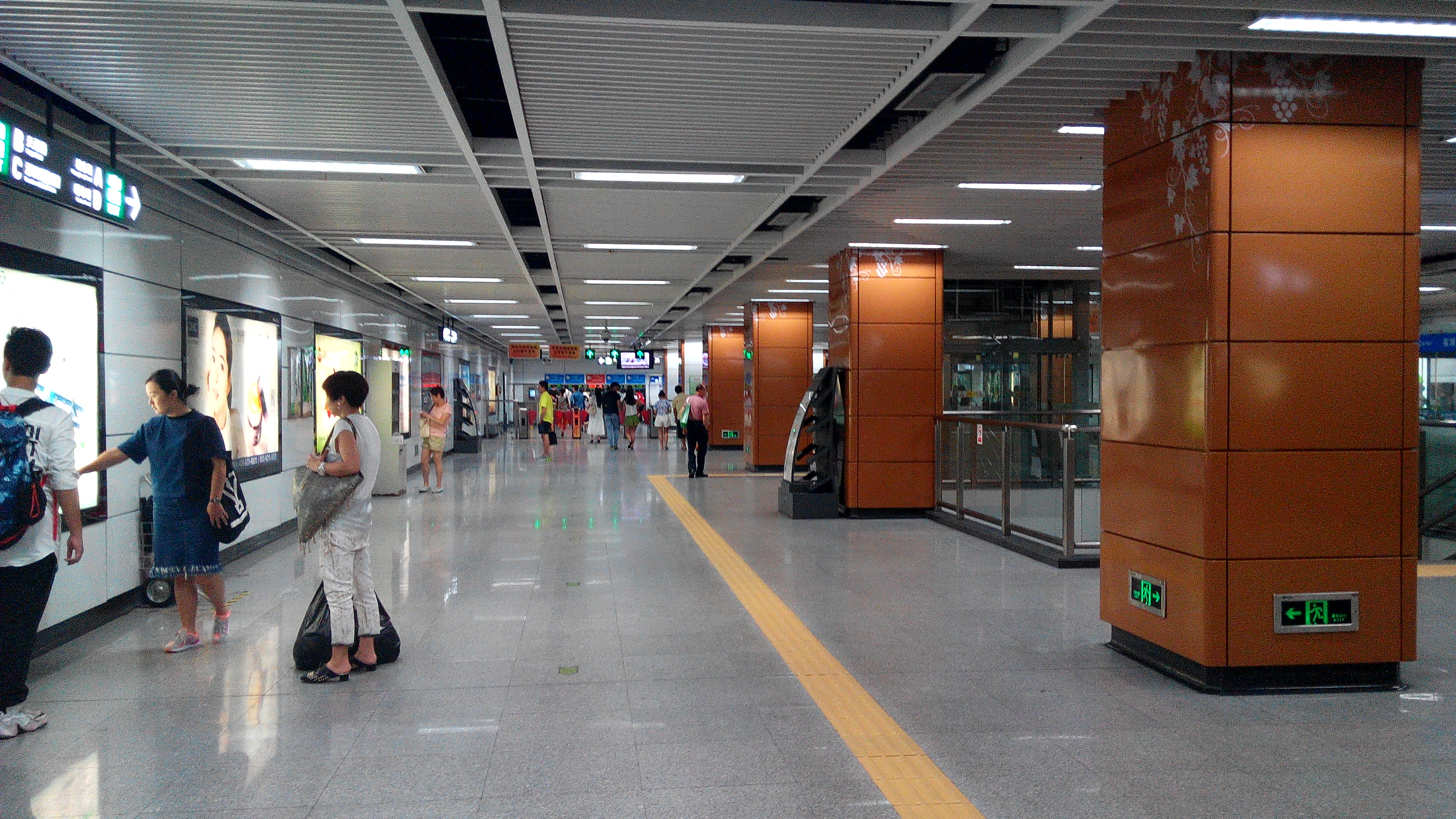 深圳地铁三号线 晒布站大堂